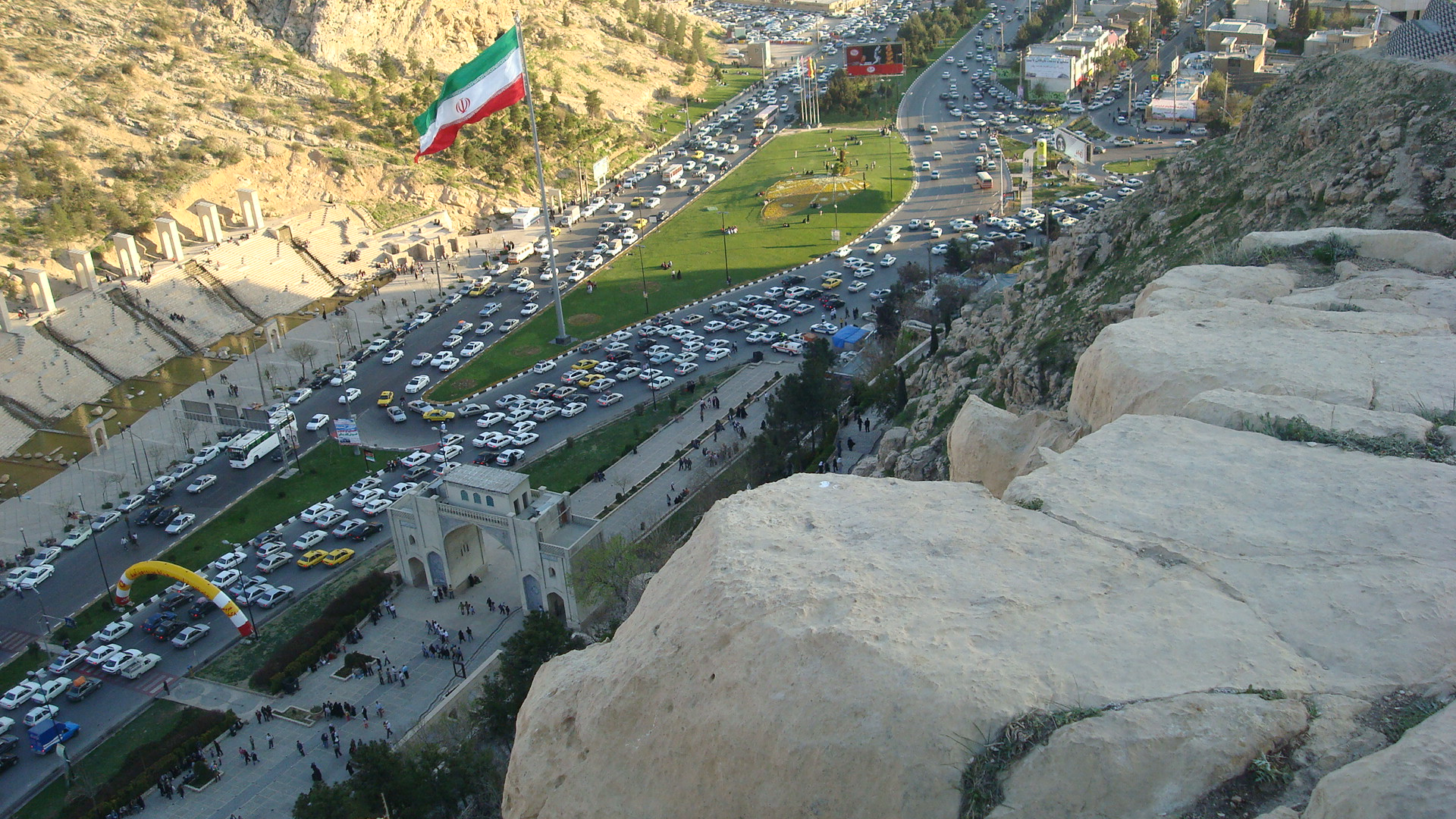 نمایی از شهر شیراز از بالای کوه مشرف به دروازه قرآن - شیراز